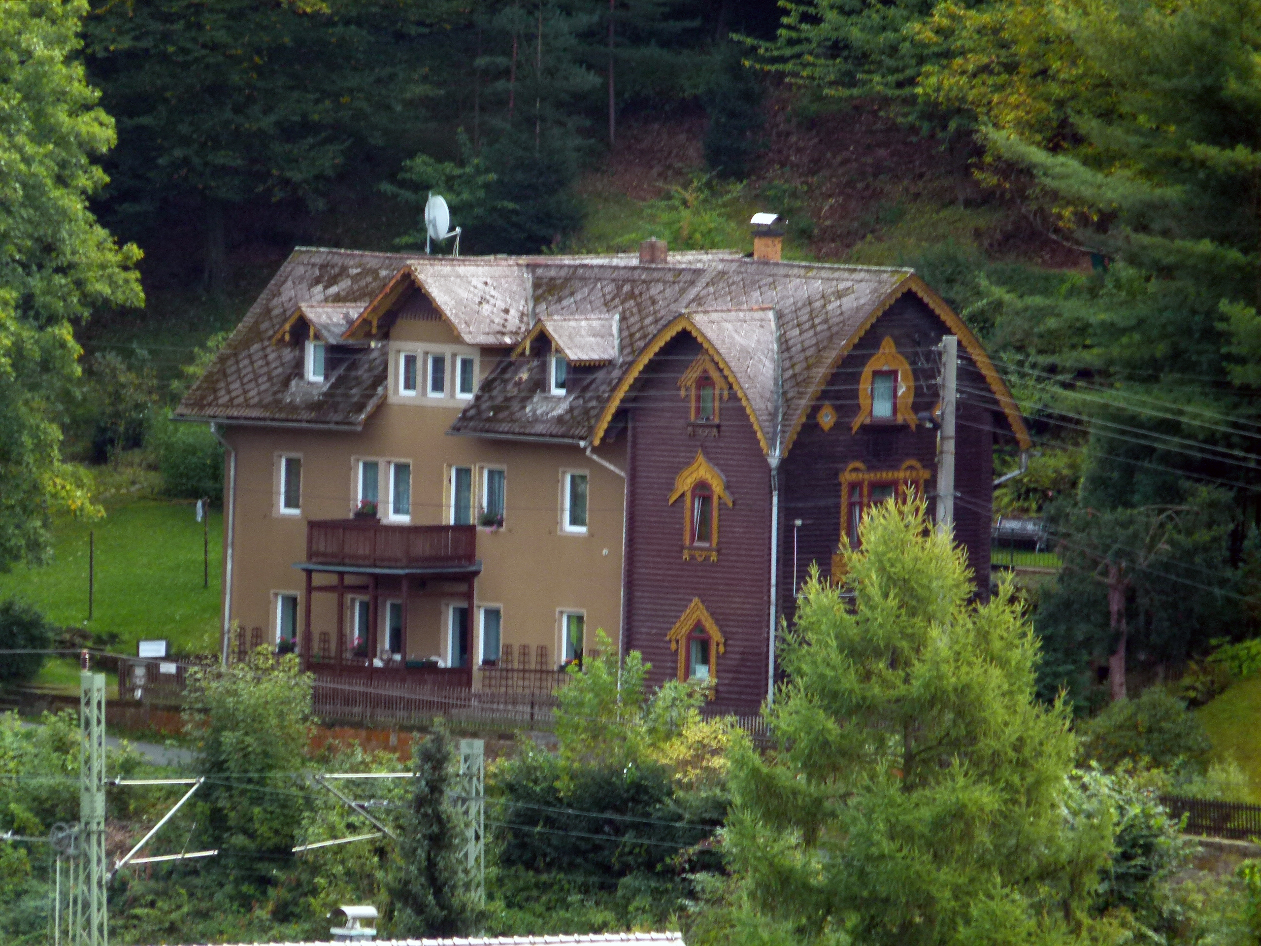 Denkmalgeschütztes Haus, Rathener Weg 3, Ortsteil Pötzscha, Stadt Wehlen, Sachsen